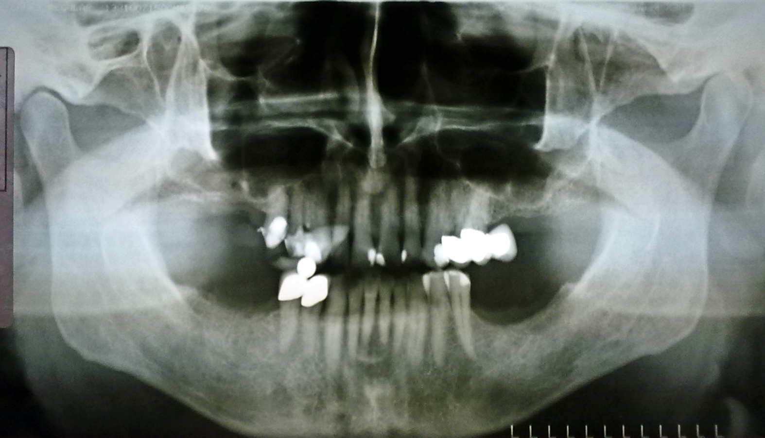 Panoramaröntgenbild von Ober- und Unterkiefer